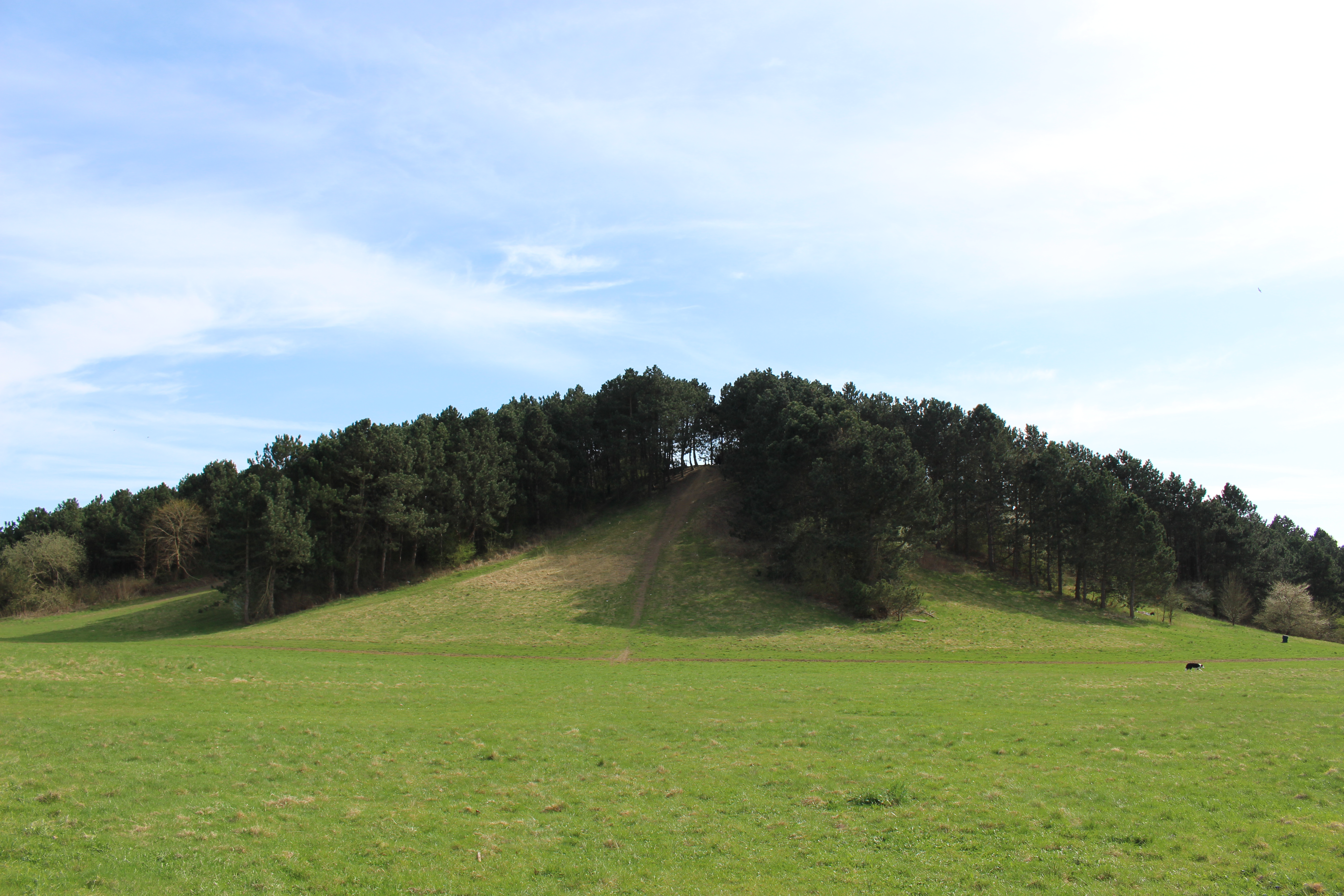 Høghsbjerget i Albertslund